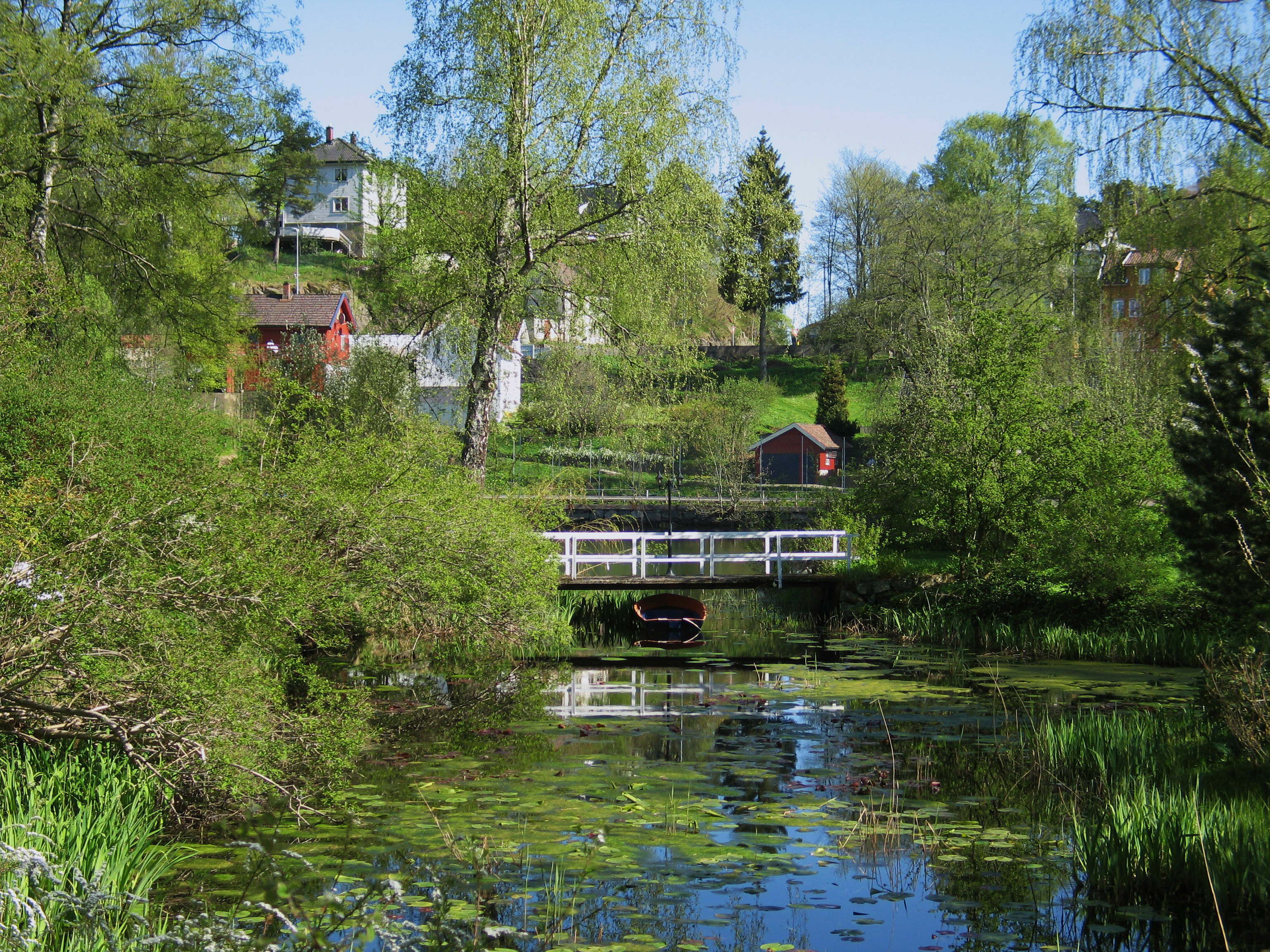 Langsævannet i Arendal